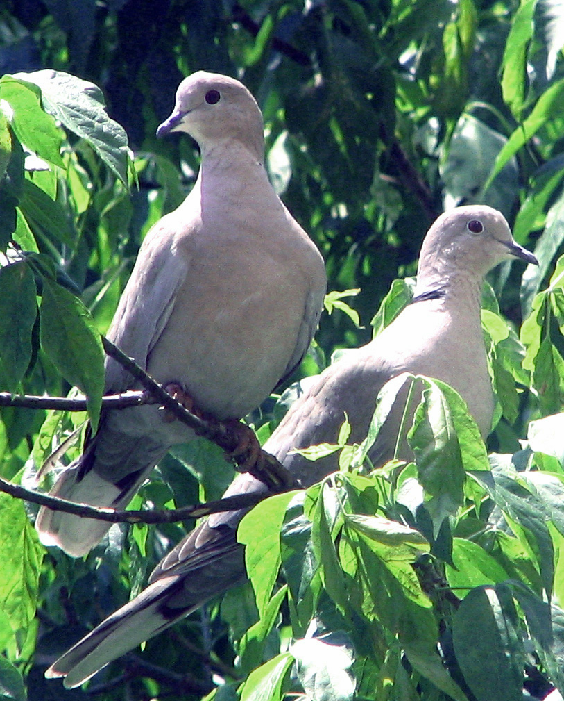 Streptopelia_decaocto